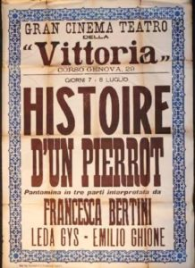 Affiche annonce pour Histoire d'un Pierrot